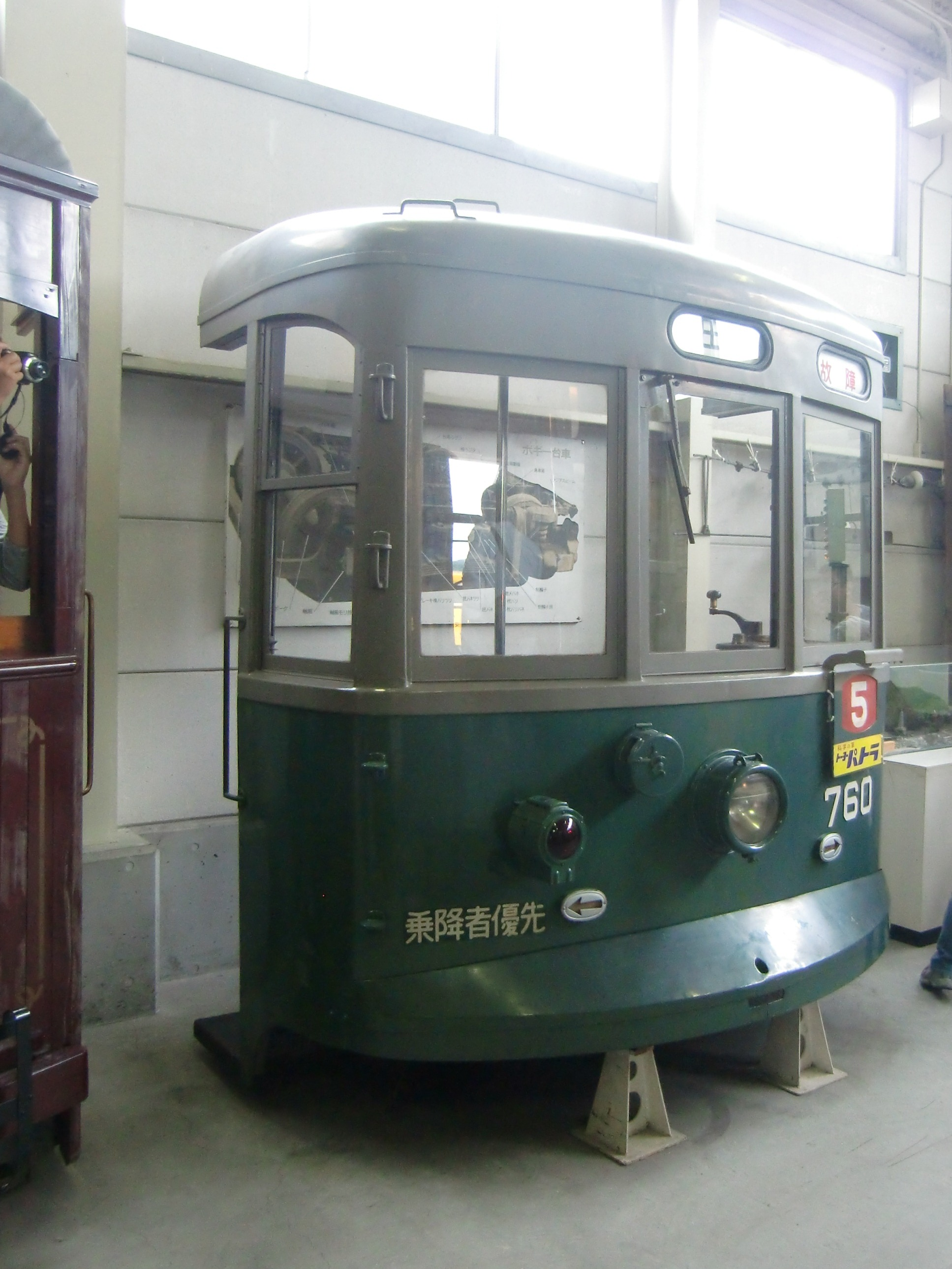 神戸市電庫で保存されている760の前頭部（2012.10.14撮影）